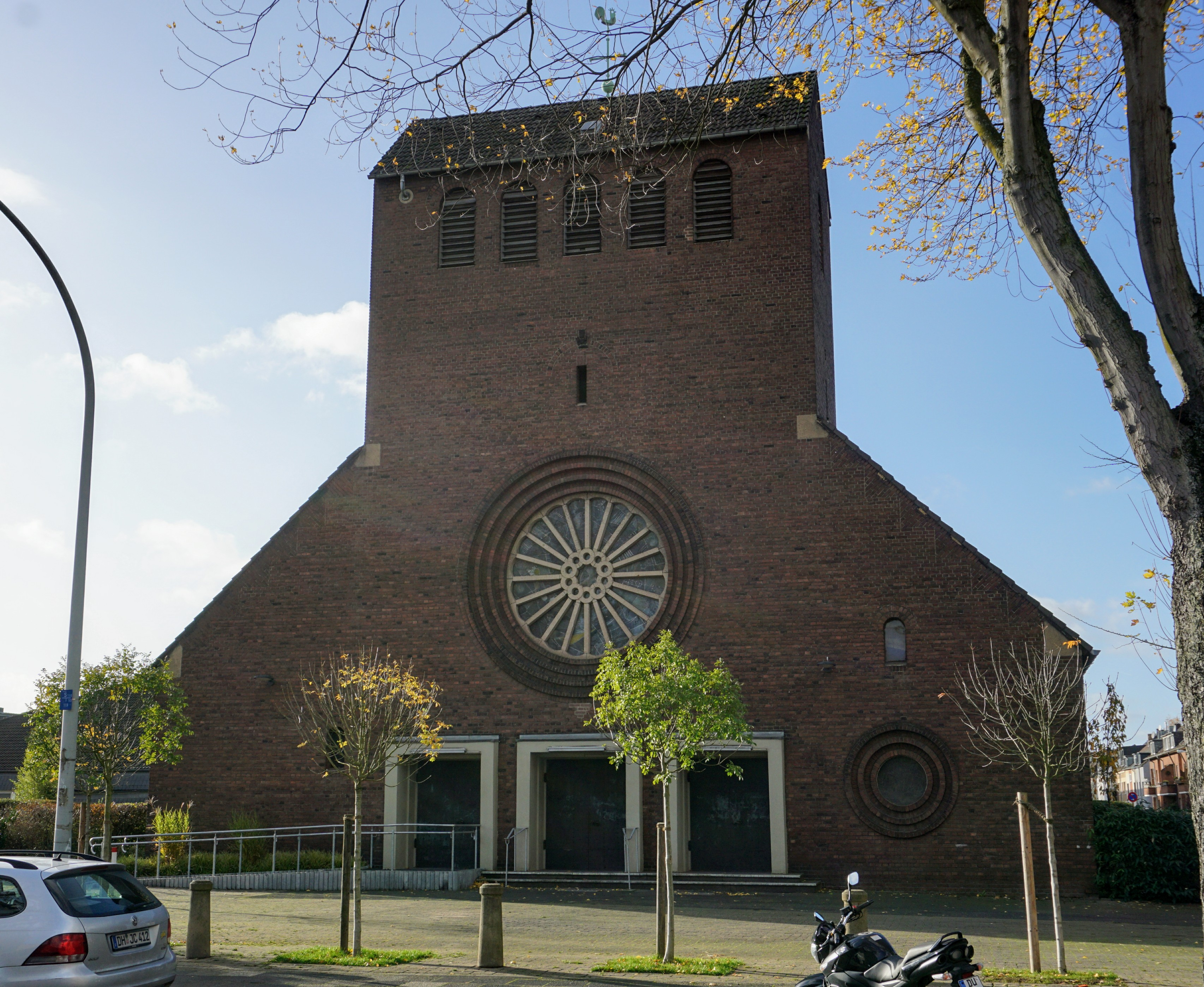 Kirche Sankt Petrus Canisius Duisburg Wanheimerort